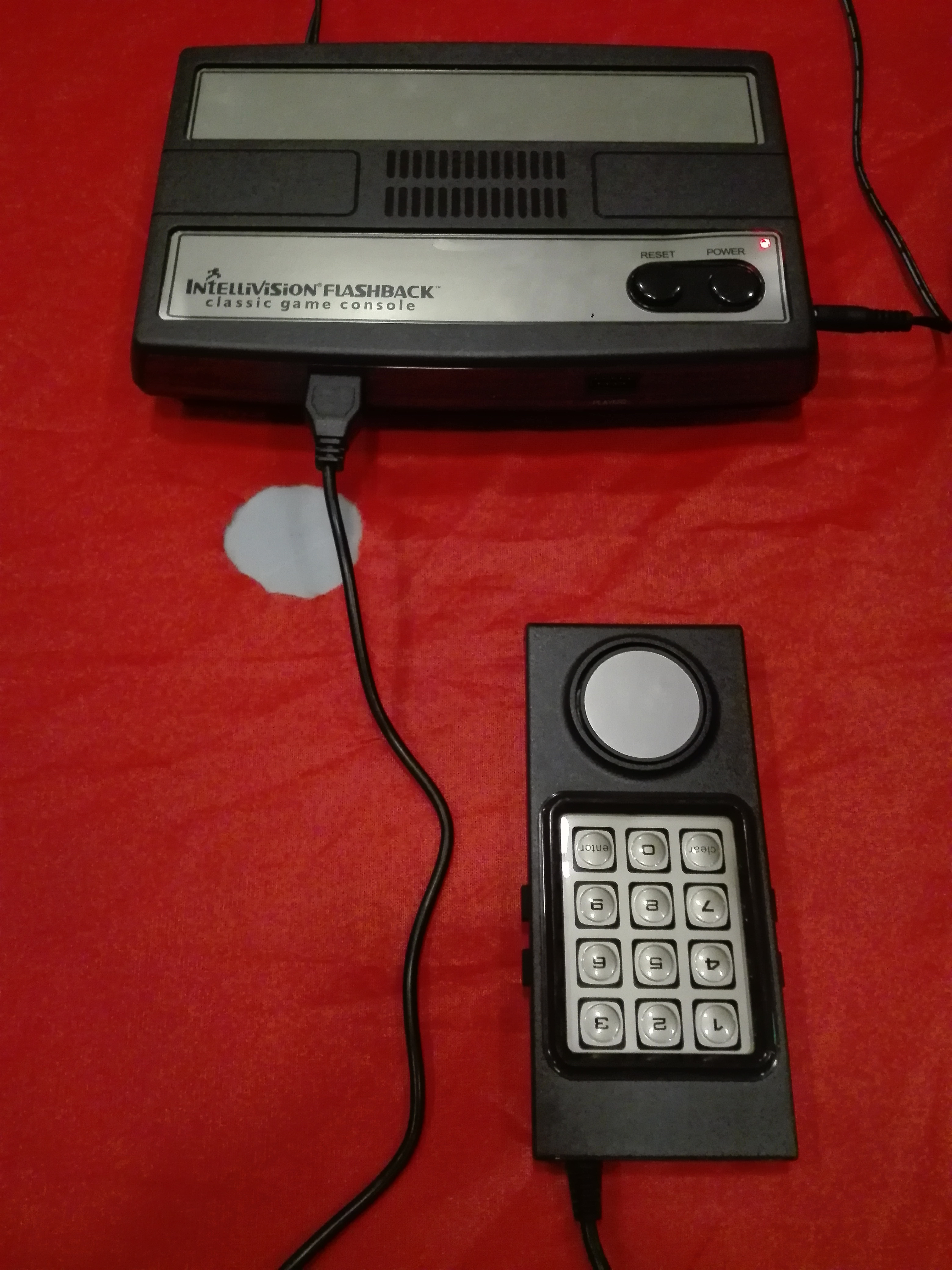 Intellivision Flashback